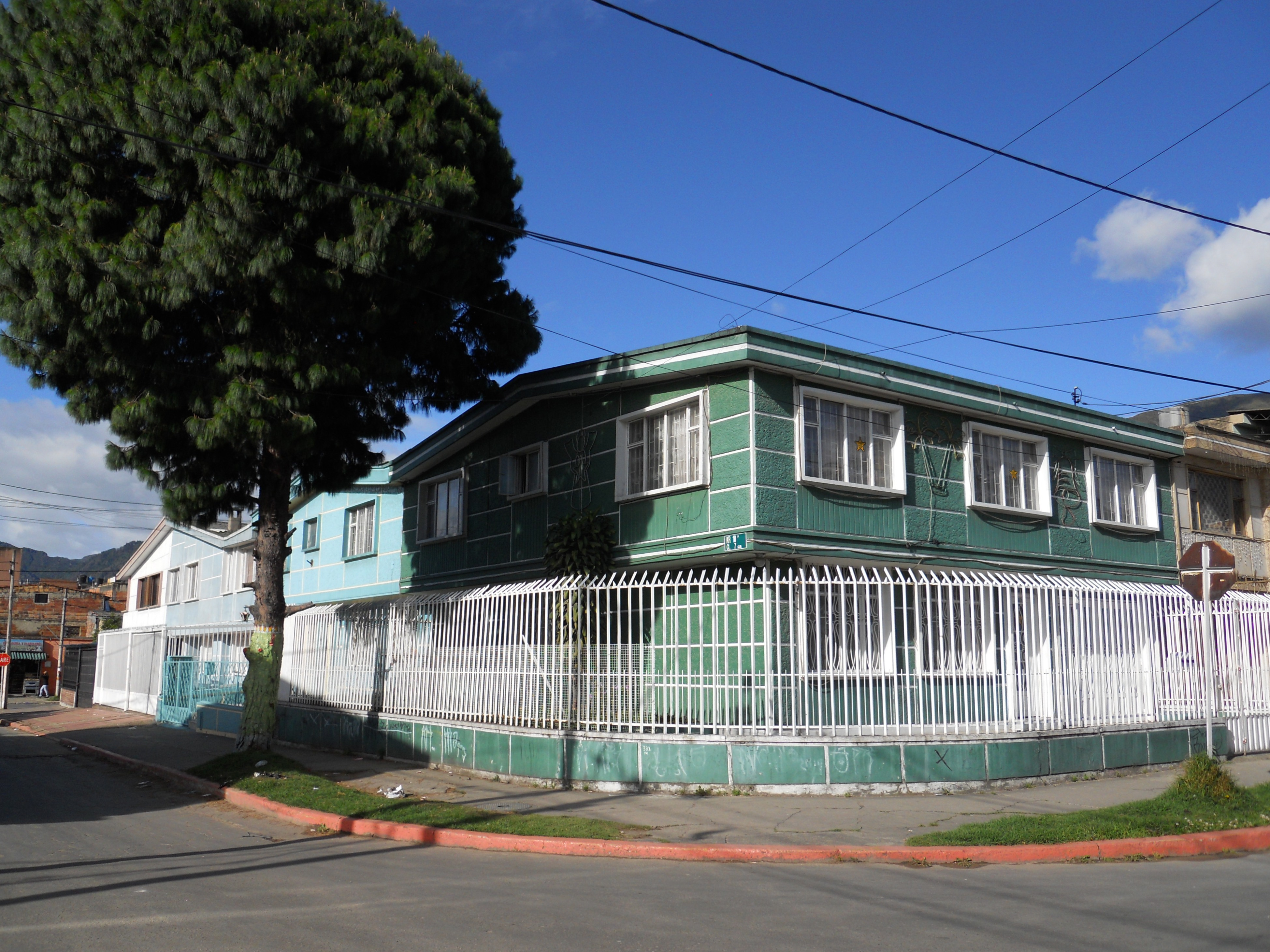 Casas en la localidad de Antonio Nariño en Bogotá, calle 7S con carrera 10A. Barrio Berna.